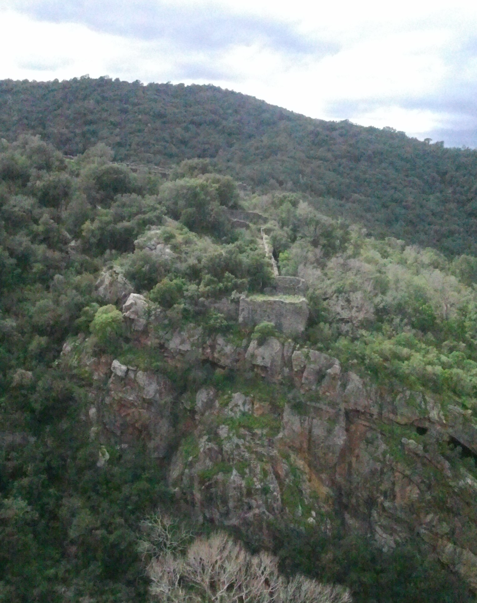 Le Château des Maures aux Cluses